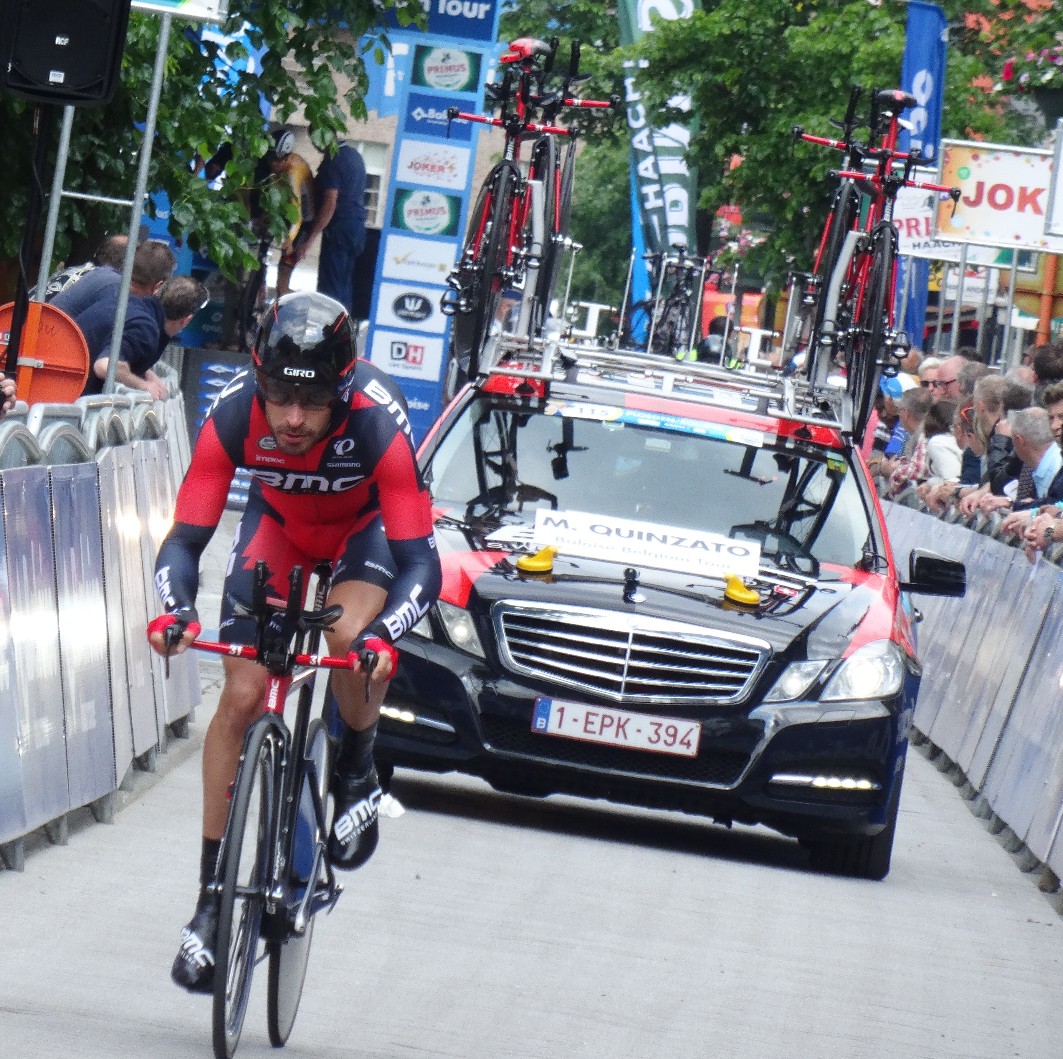 Reportage réalisé le mercredi 27 mai à l'occasion du prologue du Tour de Belgique 2015 à Bornem, Belgique.